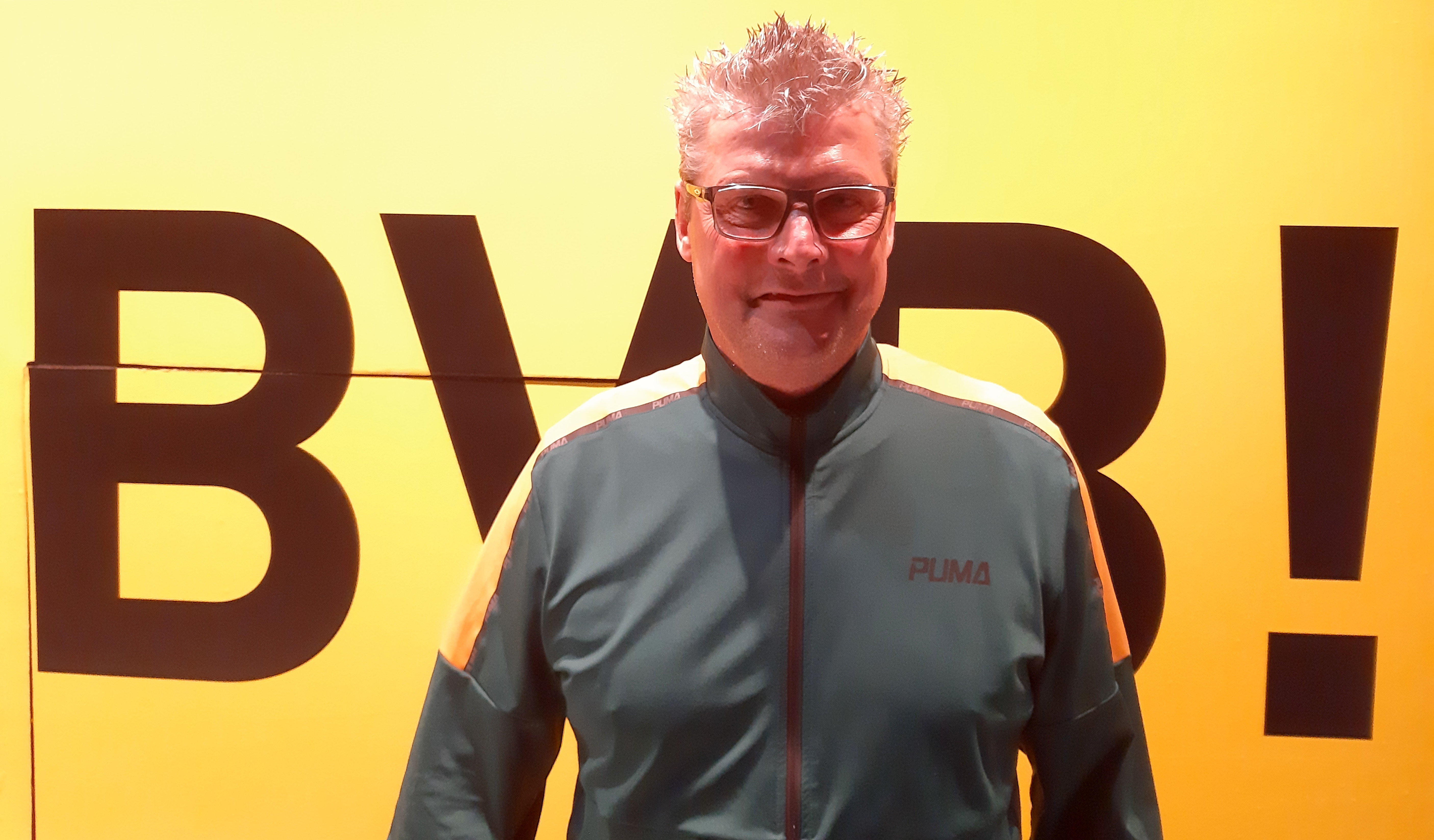 Norbert Dickel